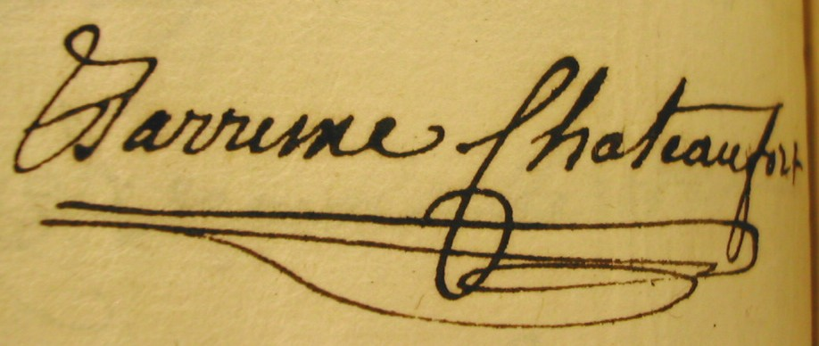 signature de Guillaume de Barrême sur son contrat de mariage